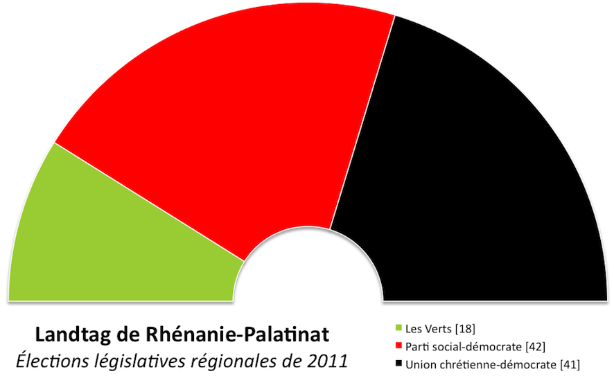 Composition politique du Landtag de Rhénanie-Palatinat après les élections régionales de mars 2011.